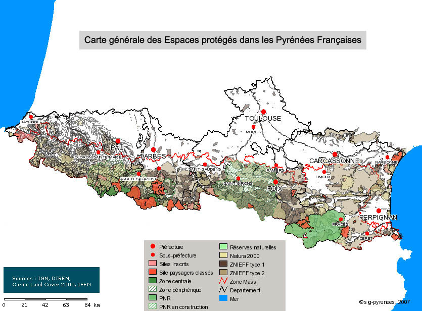 Carte générale des Espaces protégés dans les Pyrénées Françaises. Pour plus de détail, voir la Cartographie intéractive du Sig-pyrenees.